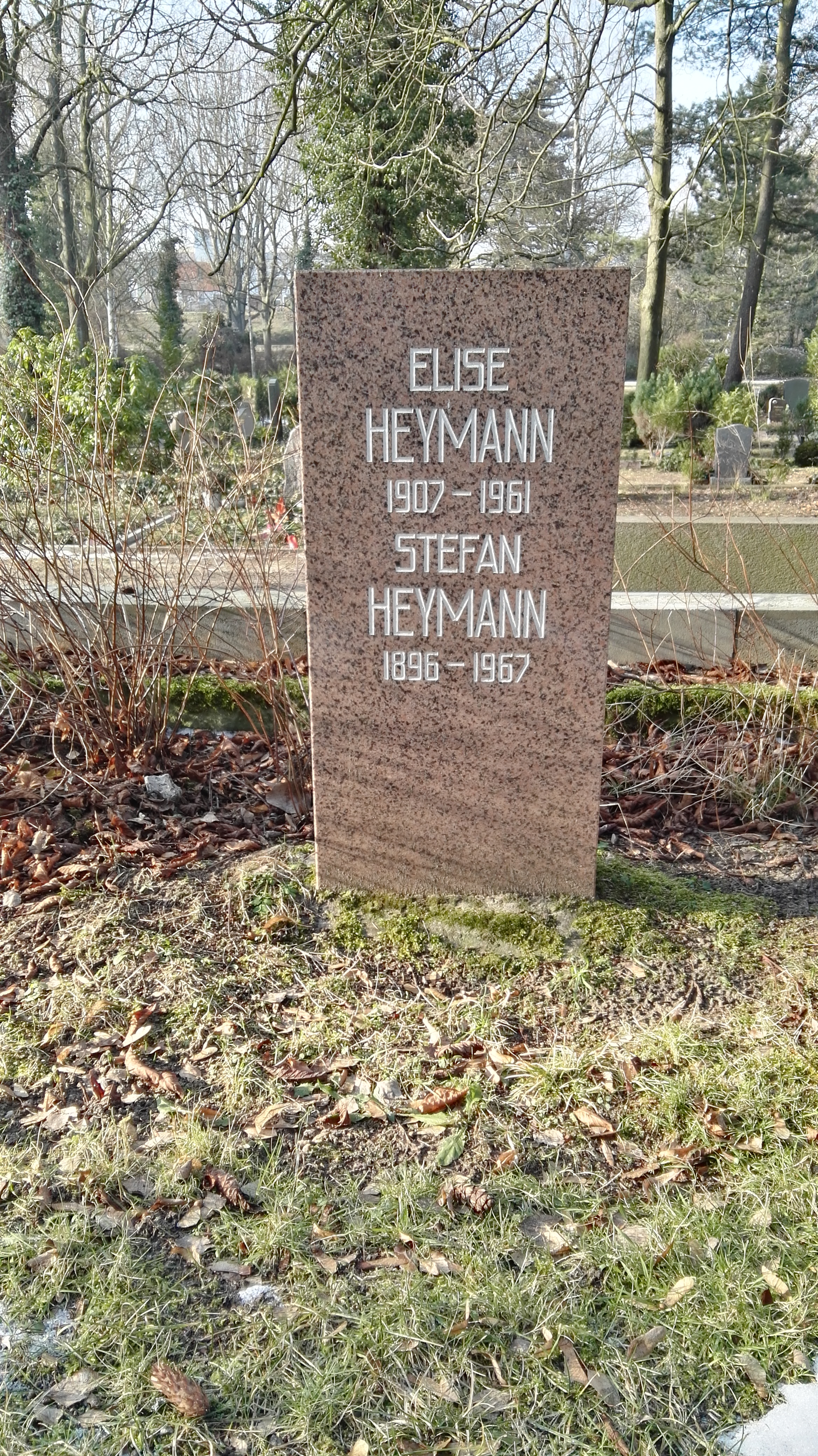 Grab von Stefan Heymann und Elise Heymann in der Grabanlage Pergolenweg auf dem Sozialistenfriedhof des Zentralfriedhofs Friedrichsfelde